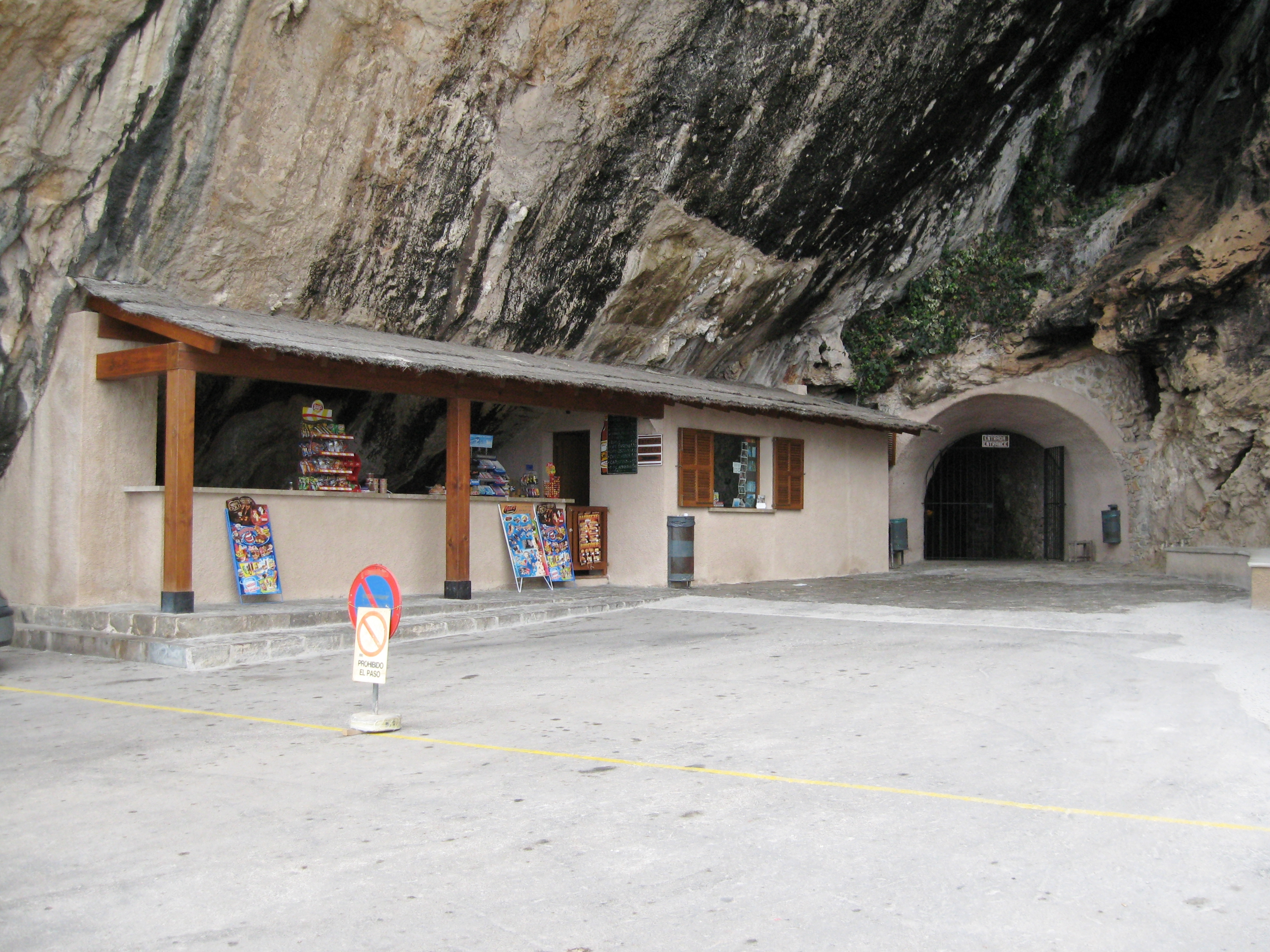 Eingang der Coves d’Artà, Gemeinde Capdepera, Mallorca, Spanien